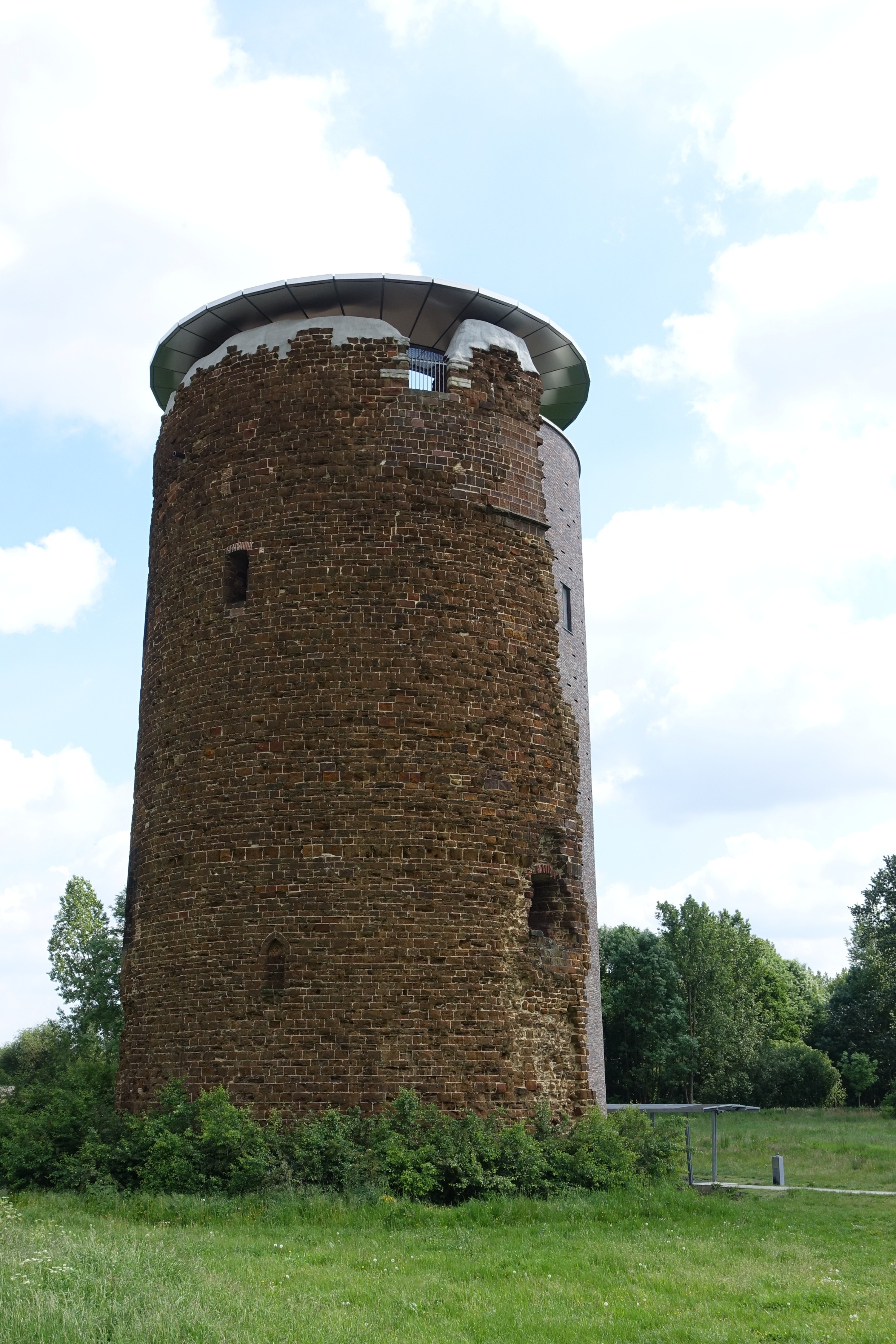 Maagdentoren, een donjon uit de 14de eeuw in Zichem (België)